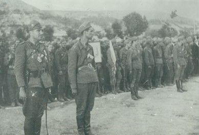 Тържественото посрещане в Крумовград на 44-ти пехотен Тунджански полк при завръщането си от фронта.